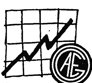 Logo del certamen Ogae Song Contest de 1987